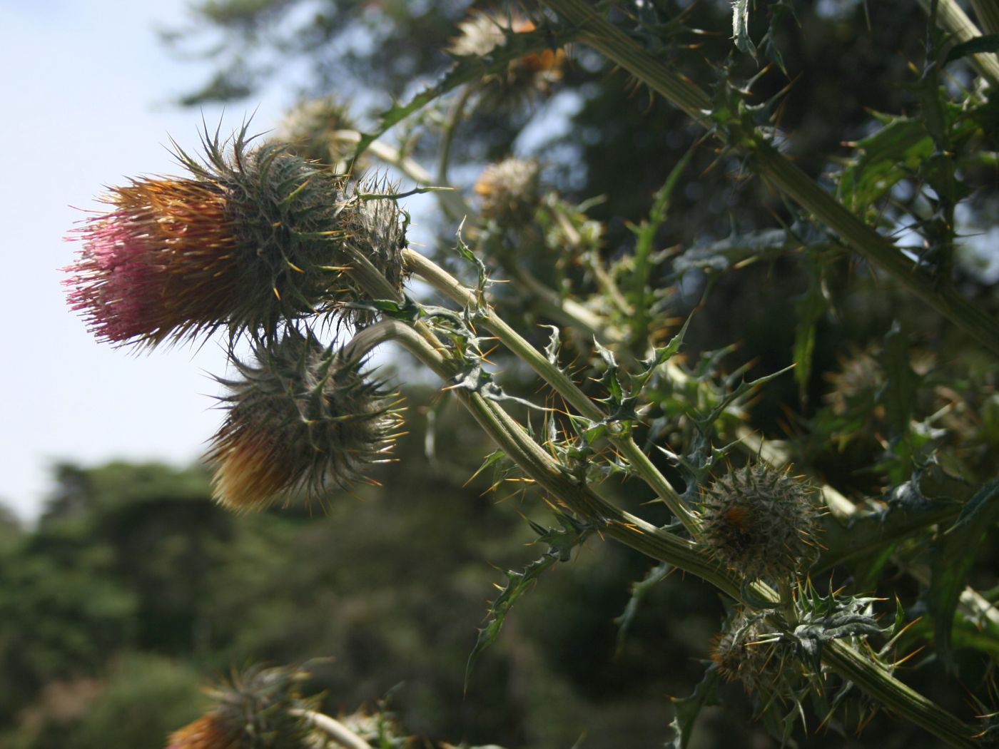 Cirsium subcoriaceum, Korbblütler (Asteraceae) - Costa Rica: Prov. Cartago, Cordillera de Talamanca, Carretera Interamericana N Cerro de la Muerte, ca. km 86, ca. 3150 m